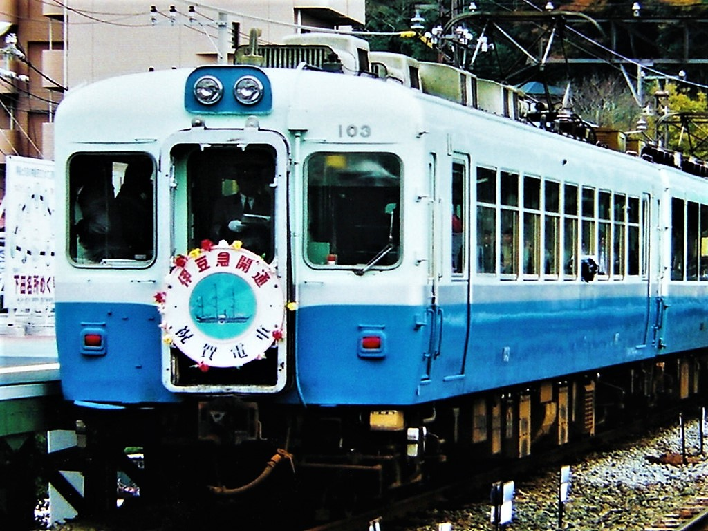 伊豆急行電鉄100系クモハ103